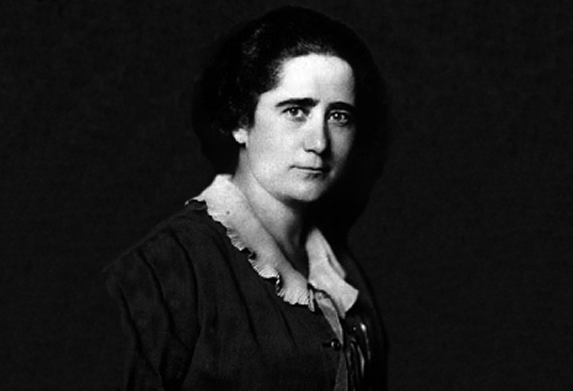 Zaščitnica ženskih pravic